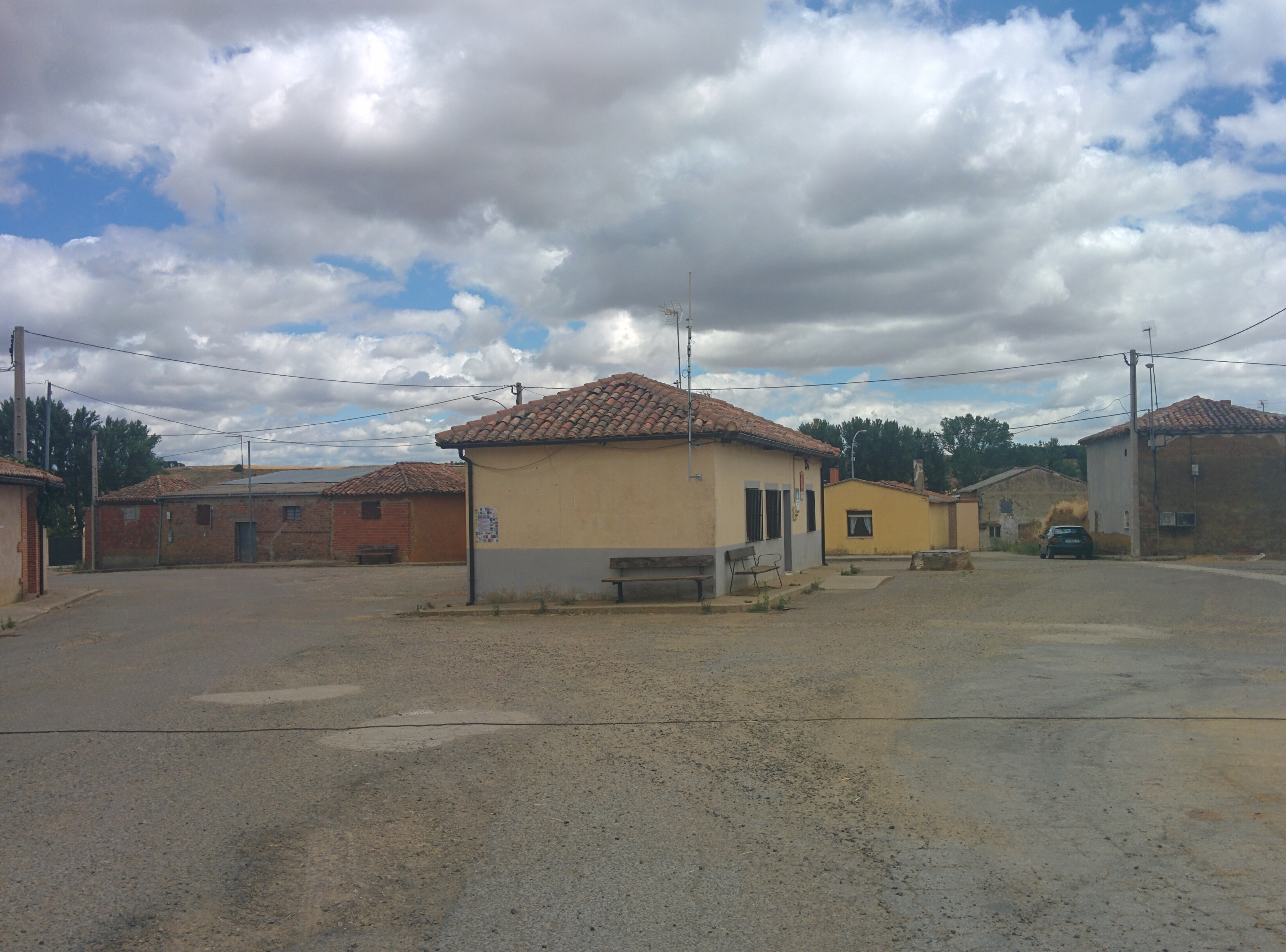 Antiguas escuelas de San Martín de la Cueza (León, España).